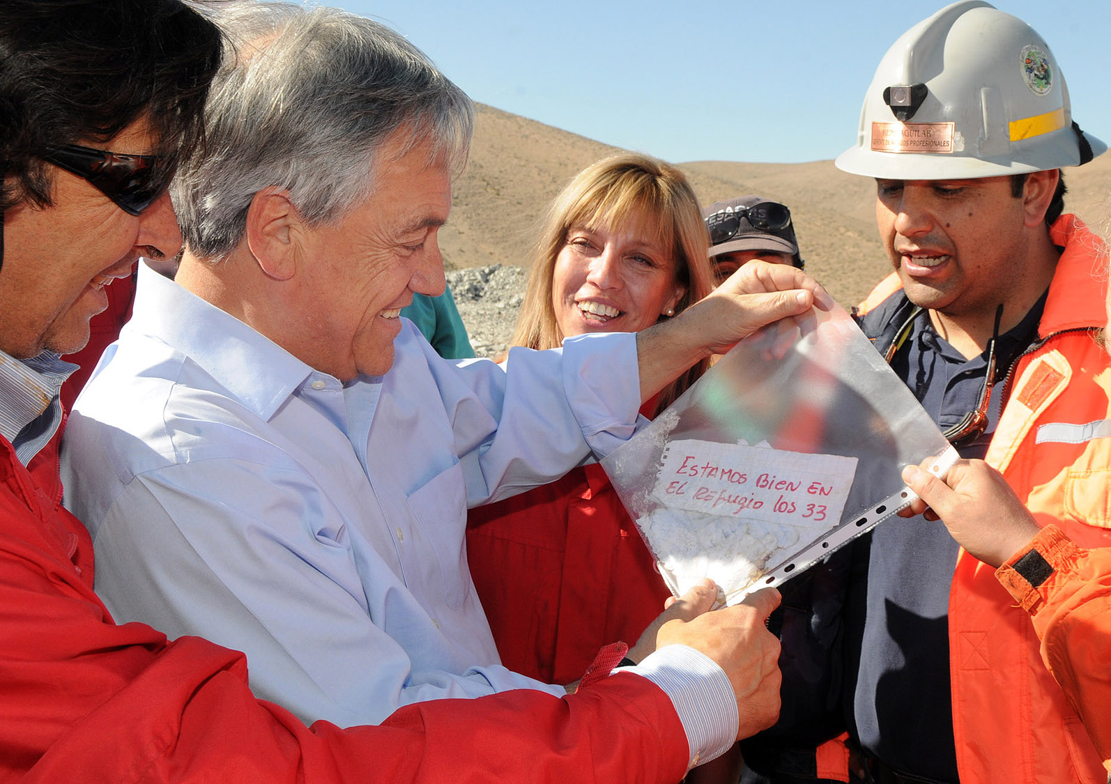 El Presidente de la República realizó una visita a la mina San José, donde comunicó al país que los 33 mineros se encontraban con vida.